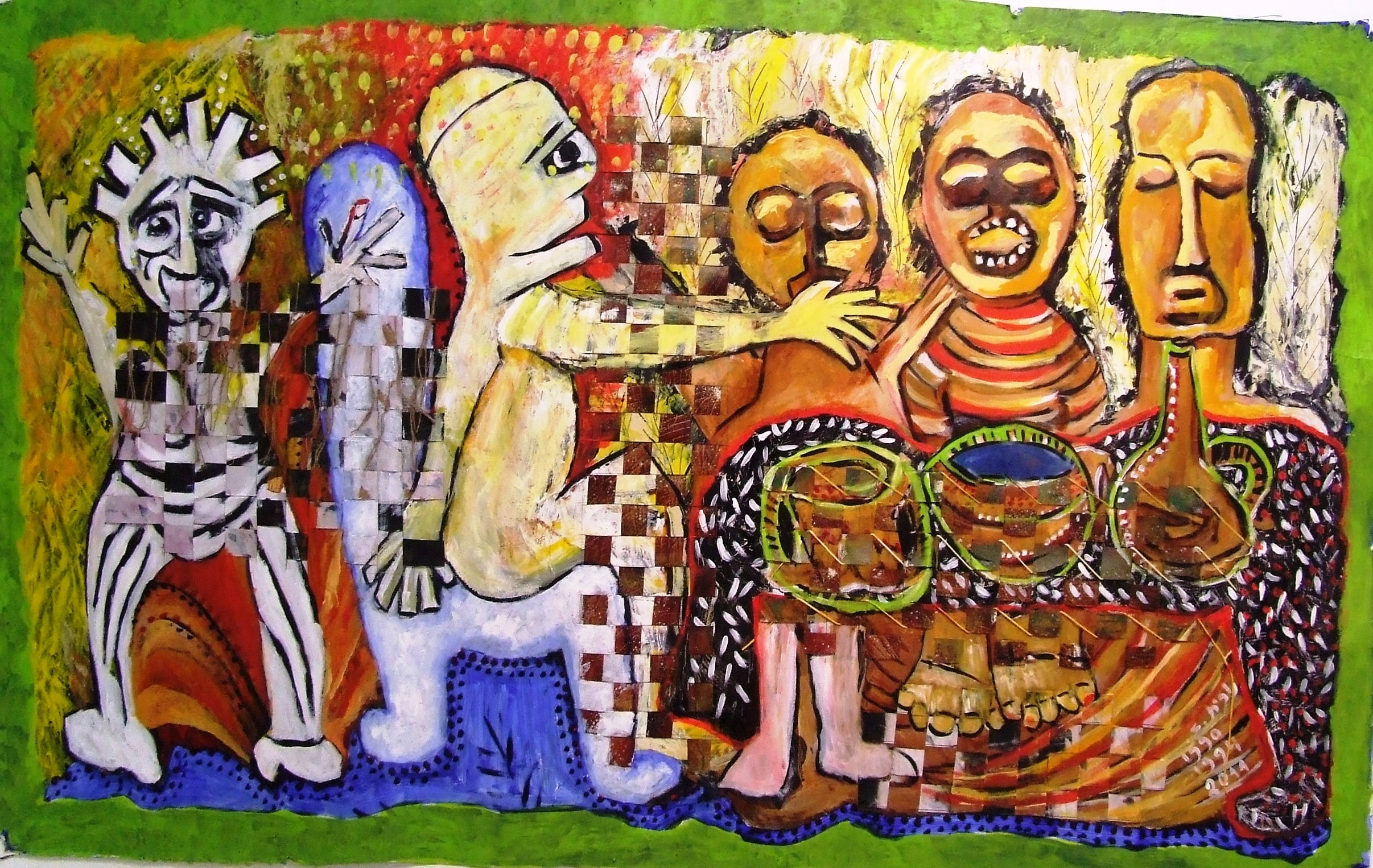 הפסלים שלי והפסלים של תרח בסעודה האחרונה